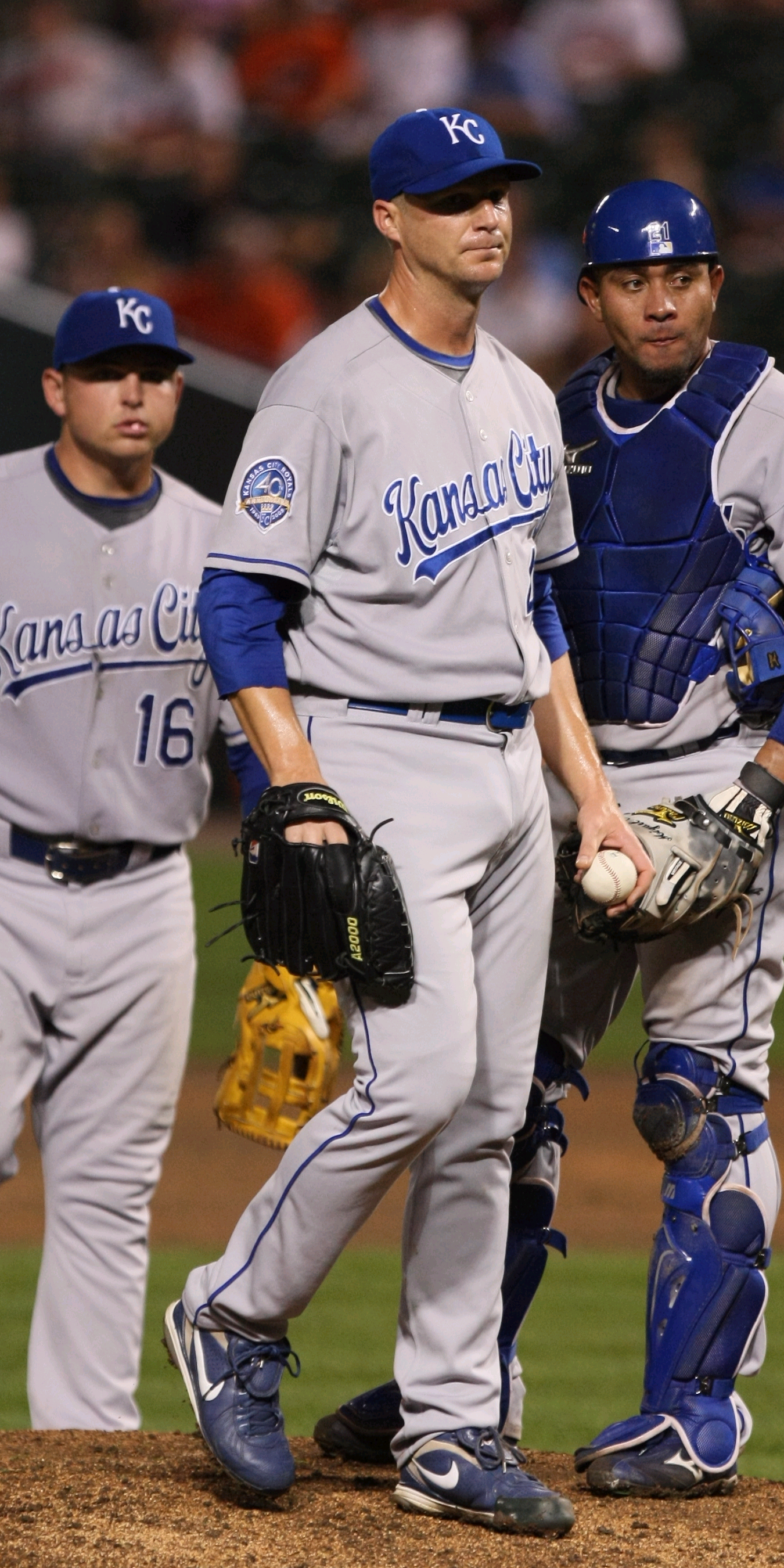 John Bale